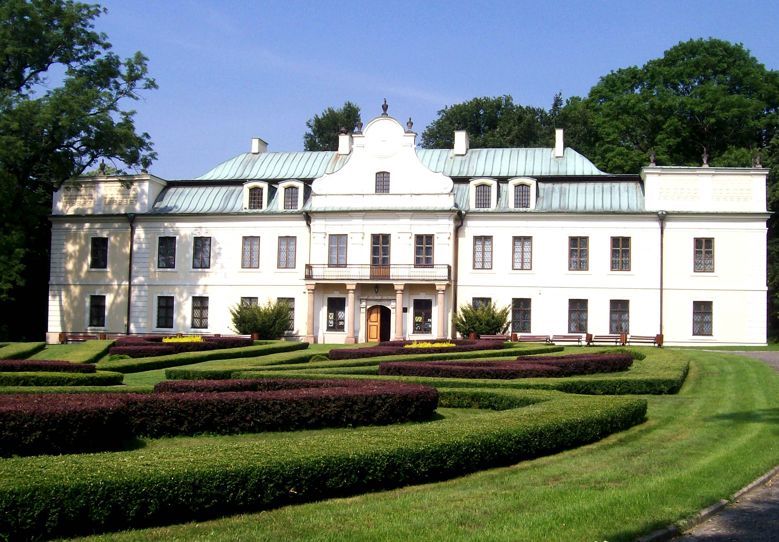 Pałac Mieroszewskich, Będzin, ul. Świerczewskiego 15